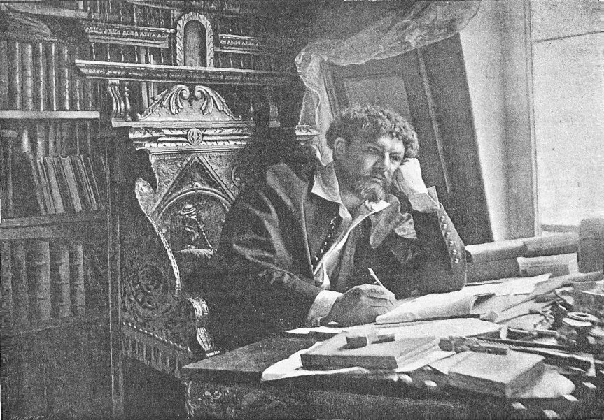 Jean Richepin dans son atelier par Dornac